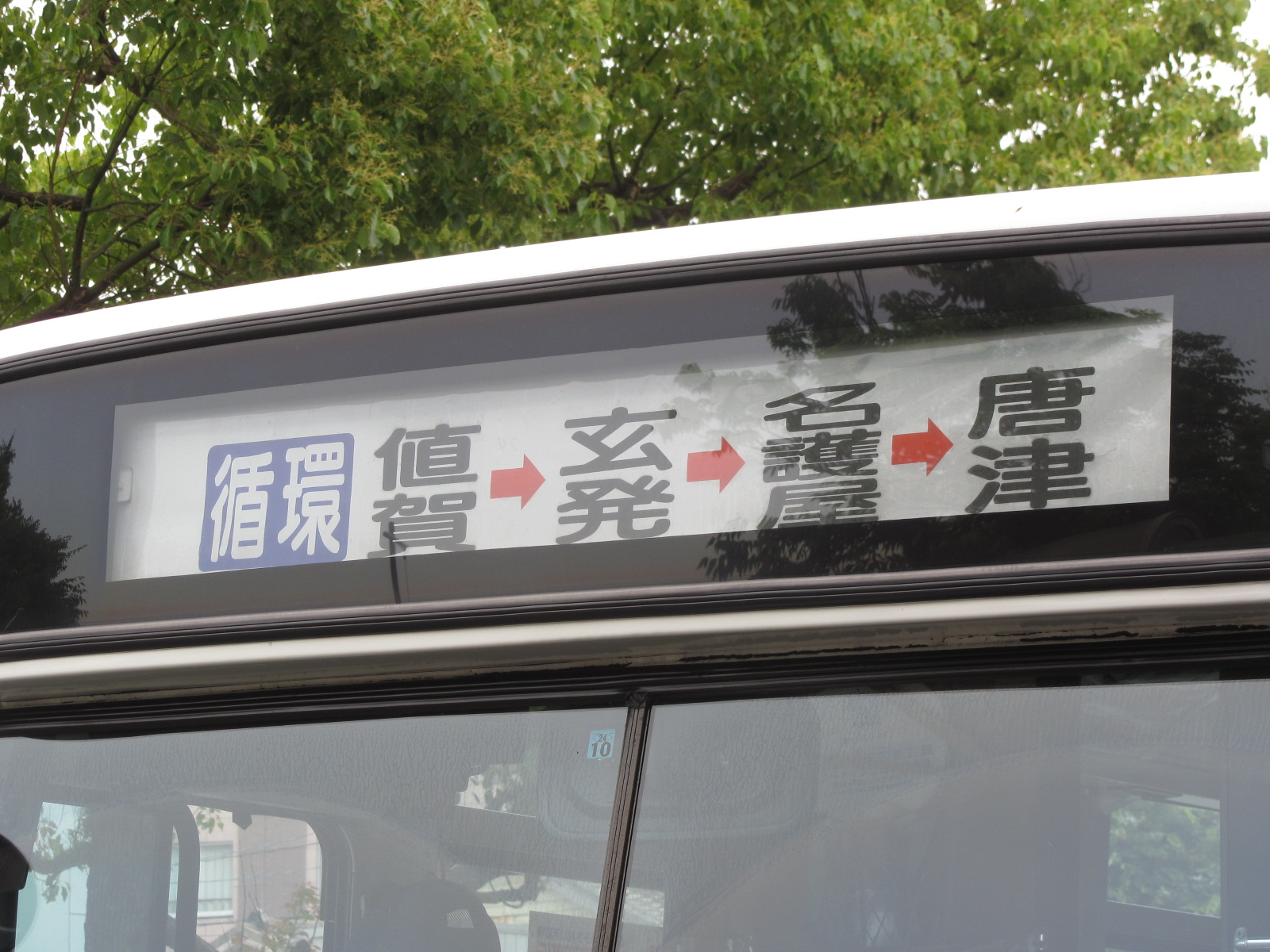 名護屋循環線に使用される特徴的な方向幕。